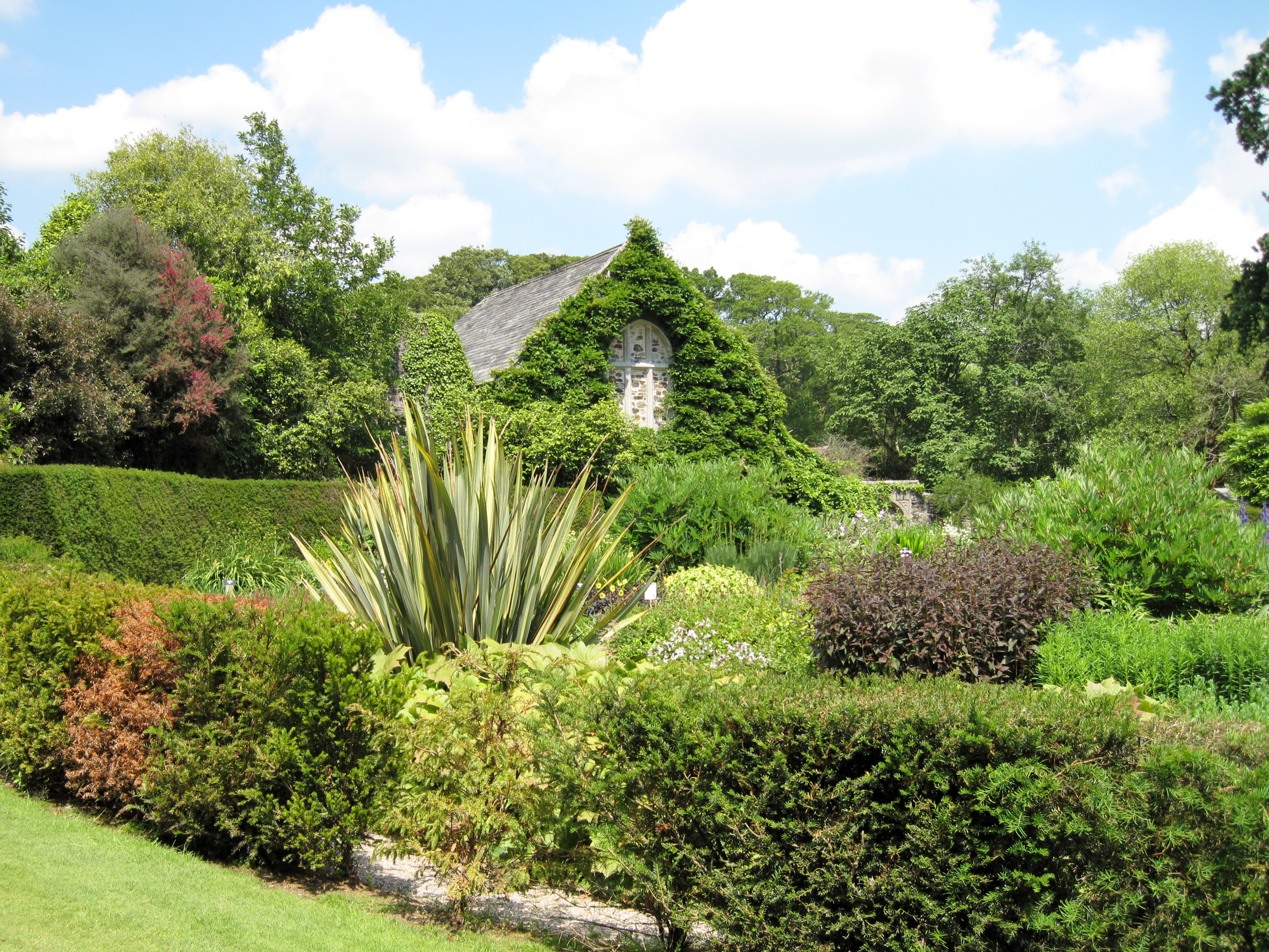 Staudenkreis im Garten von Lanhydrock, einem Herrenhaus nahe Bodmin in Cornwall, England